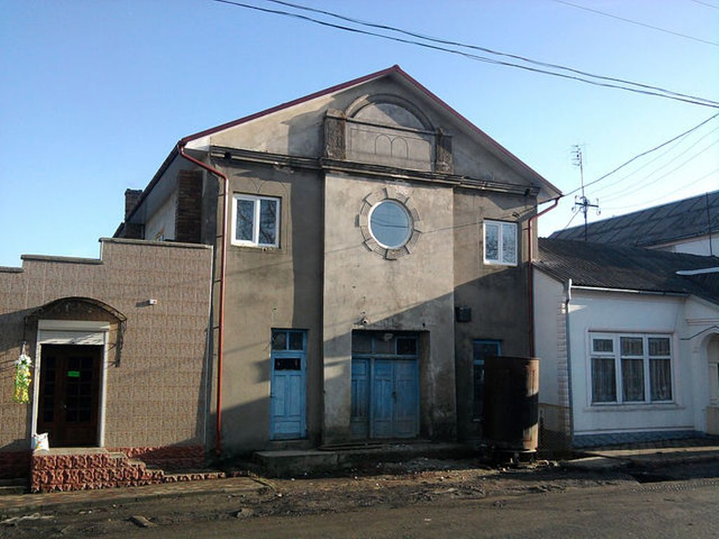 Fosta sinagogă din Herța, regiunea Cernăuți, Ucraina